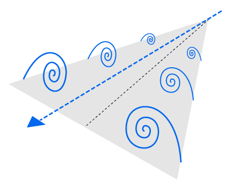 Schematische Darstellung der Wirbelbildung am Deltaflügel bei 15° Anstellung.